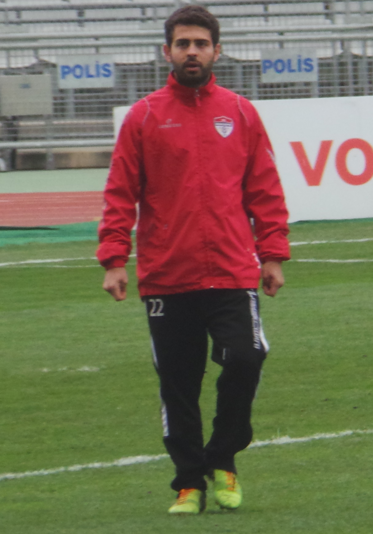 Hakan turan